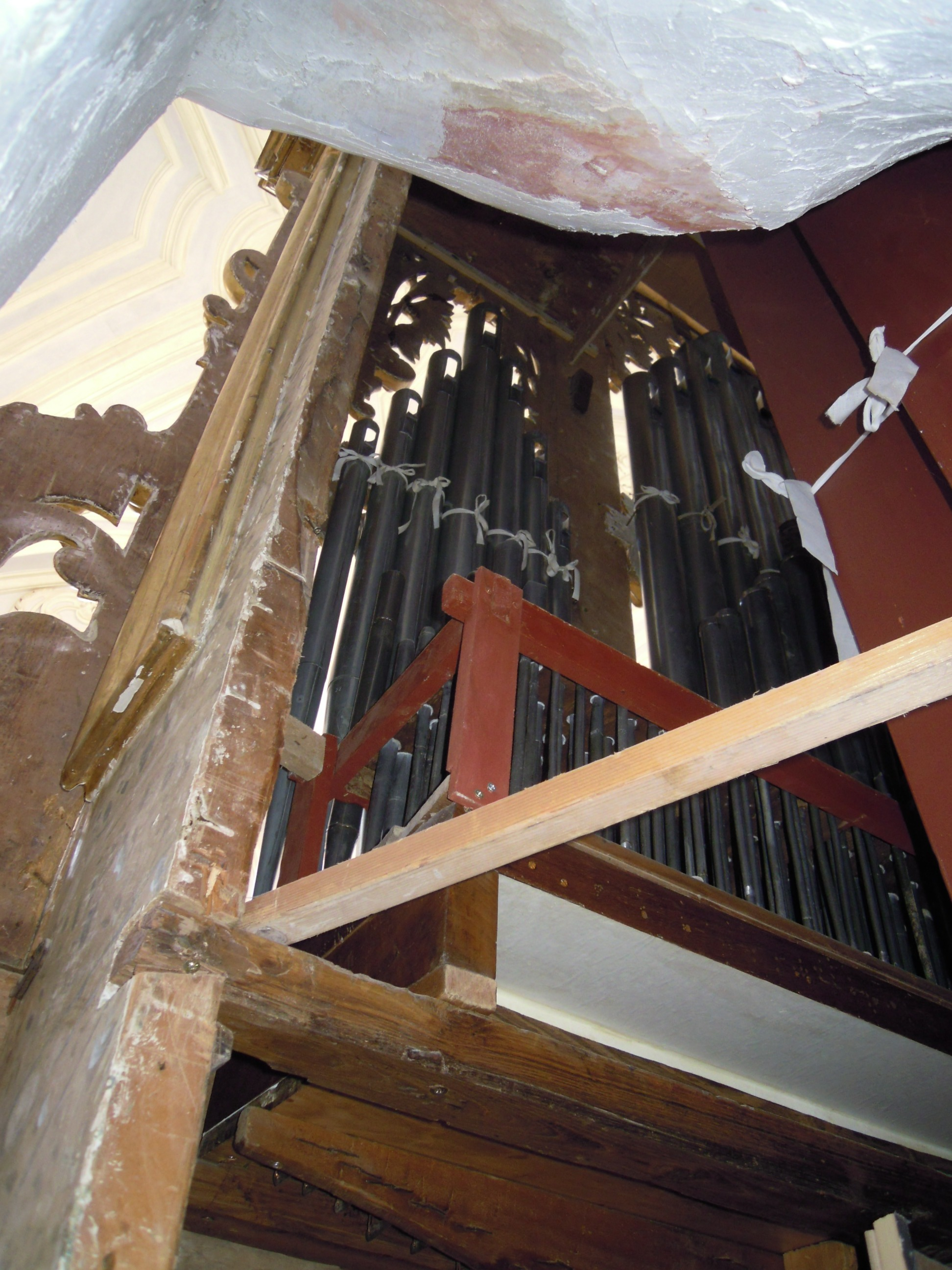 Interno dell'organo del Santuario della Santissima Annunziata in Gaeta